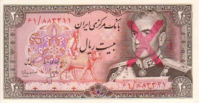 20 иранских риалов обр. 1974. Аверс. Надпечатка "Крест на шахе".